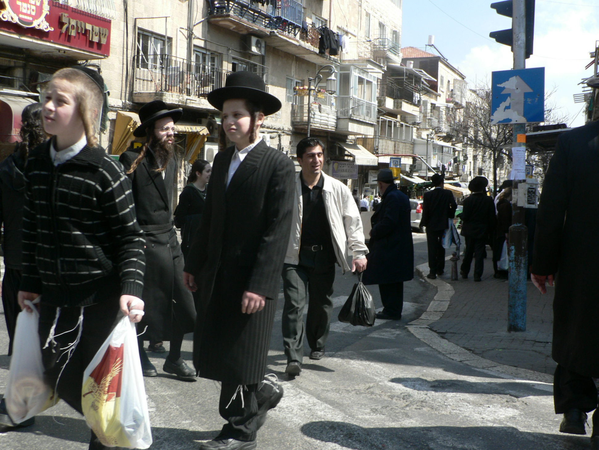 Jérusalem - Place du Shabbat et rue Mea Shearim. A gauche, magasin "שטריימל סנטר" (Shtreimel Center). Les jeunes garçons figurant au premier plan portent des péotes (méches de cheveux latérales) et une tenue vestimentaire caractéristique du judaisme ultra-orthodoxe.